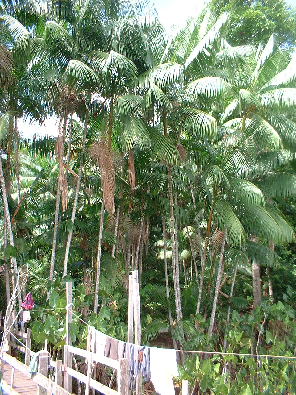 Touceiras de açaí na beira do rio no Pará